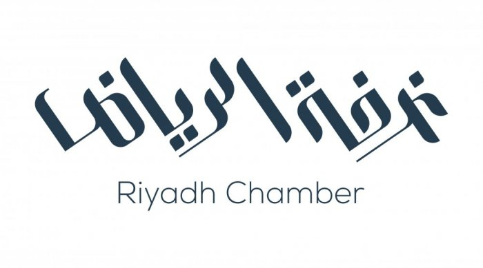 شعار غرفة الرياض